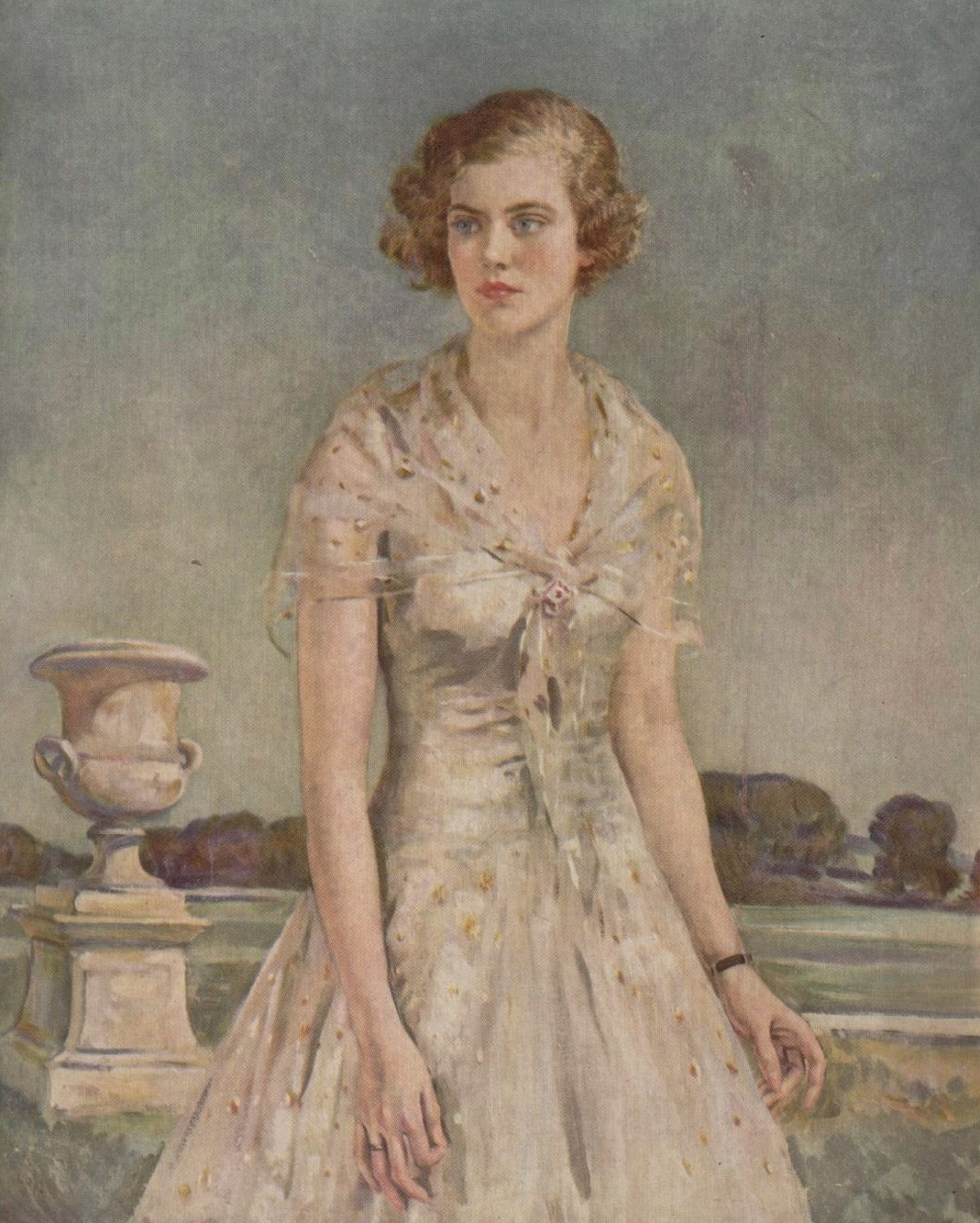 Lady Mary Lygon (vers 1930) par William Bruce Ellis Ranken (1881-1941).